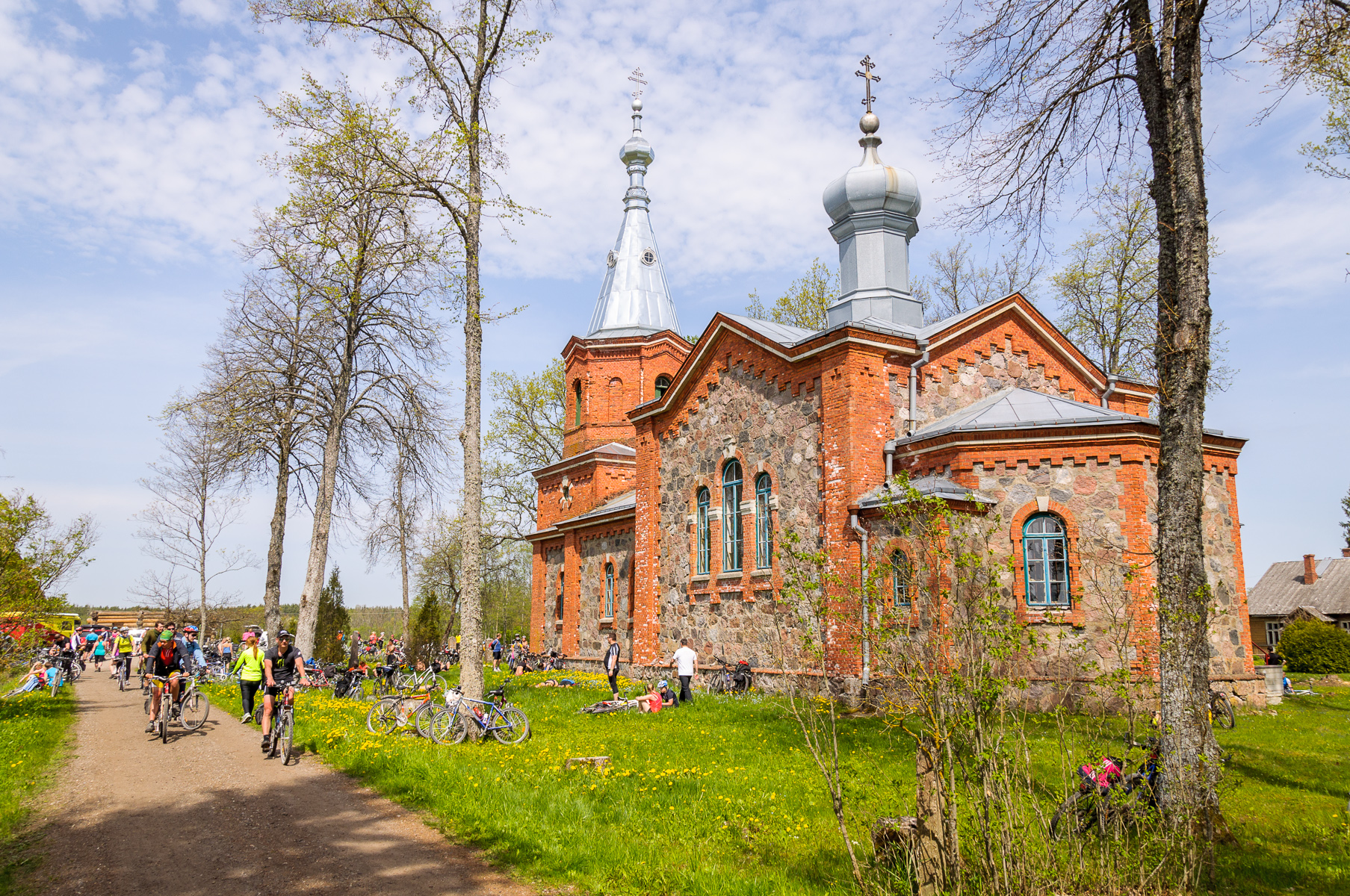 Velise õigeusu kirik